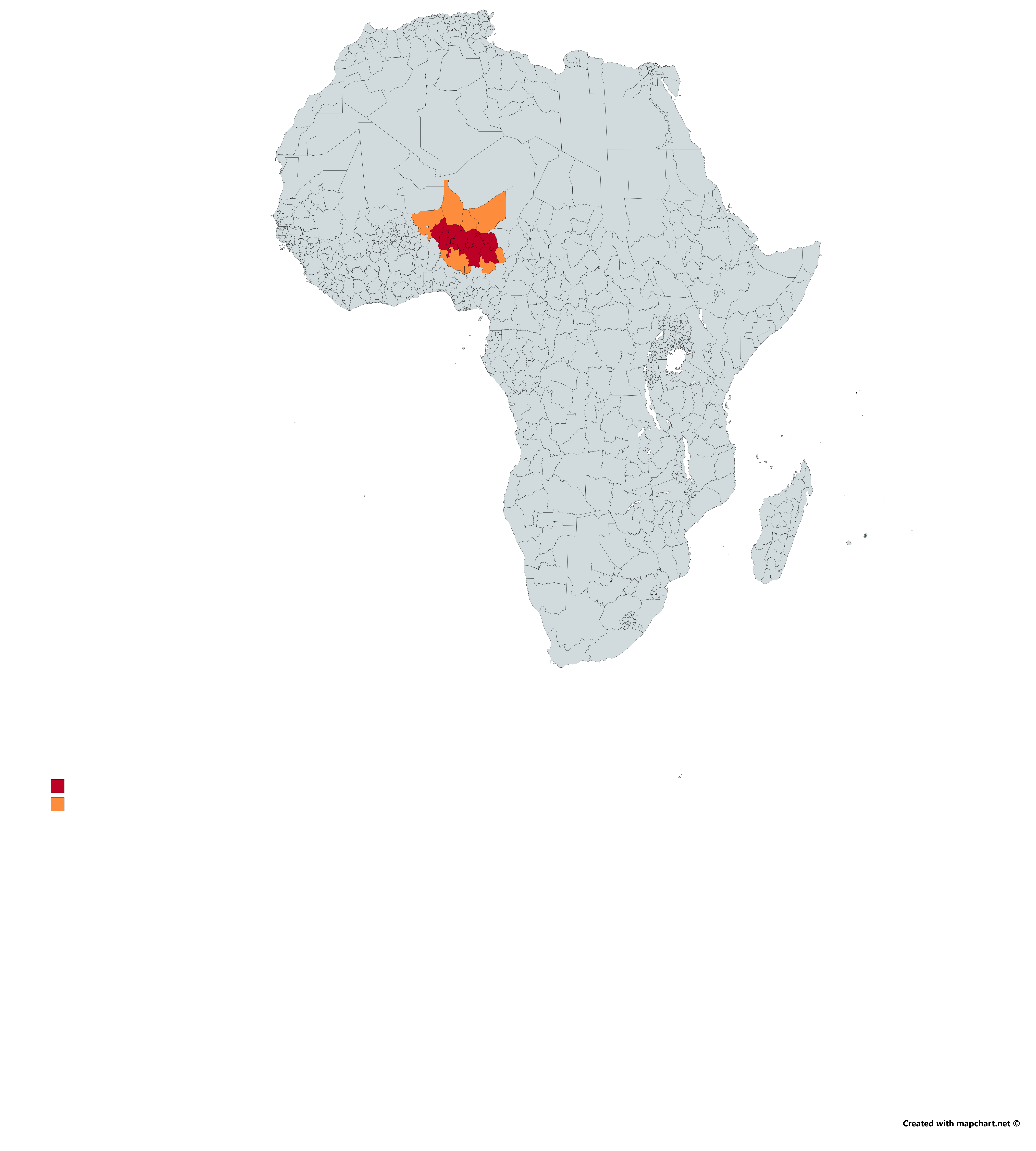 Dispertion du peuple Haoussas